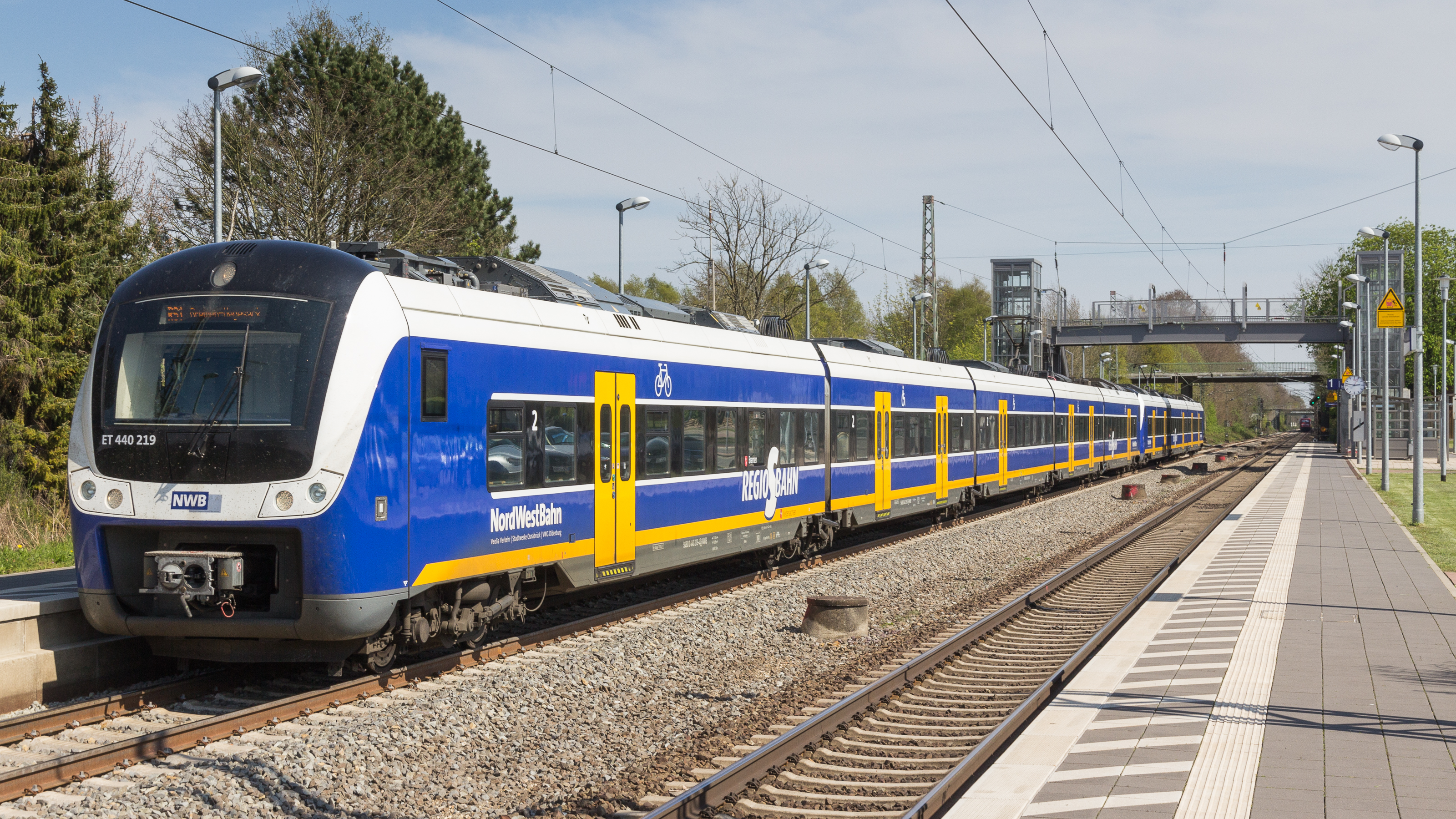 NWB ET 440 219 in (Achim-)Baden, Ldkrs. Verden/Aller